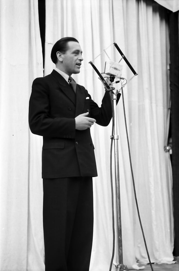 Schloss Güterfelde, Truppenbetreuung: Rolf Wernicke